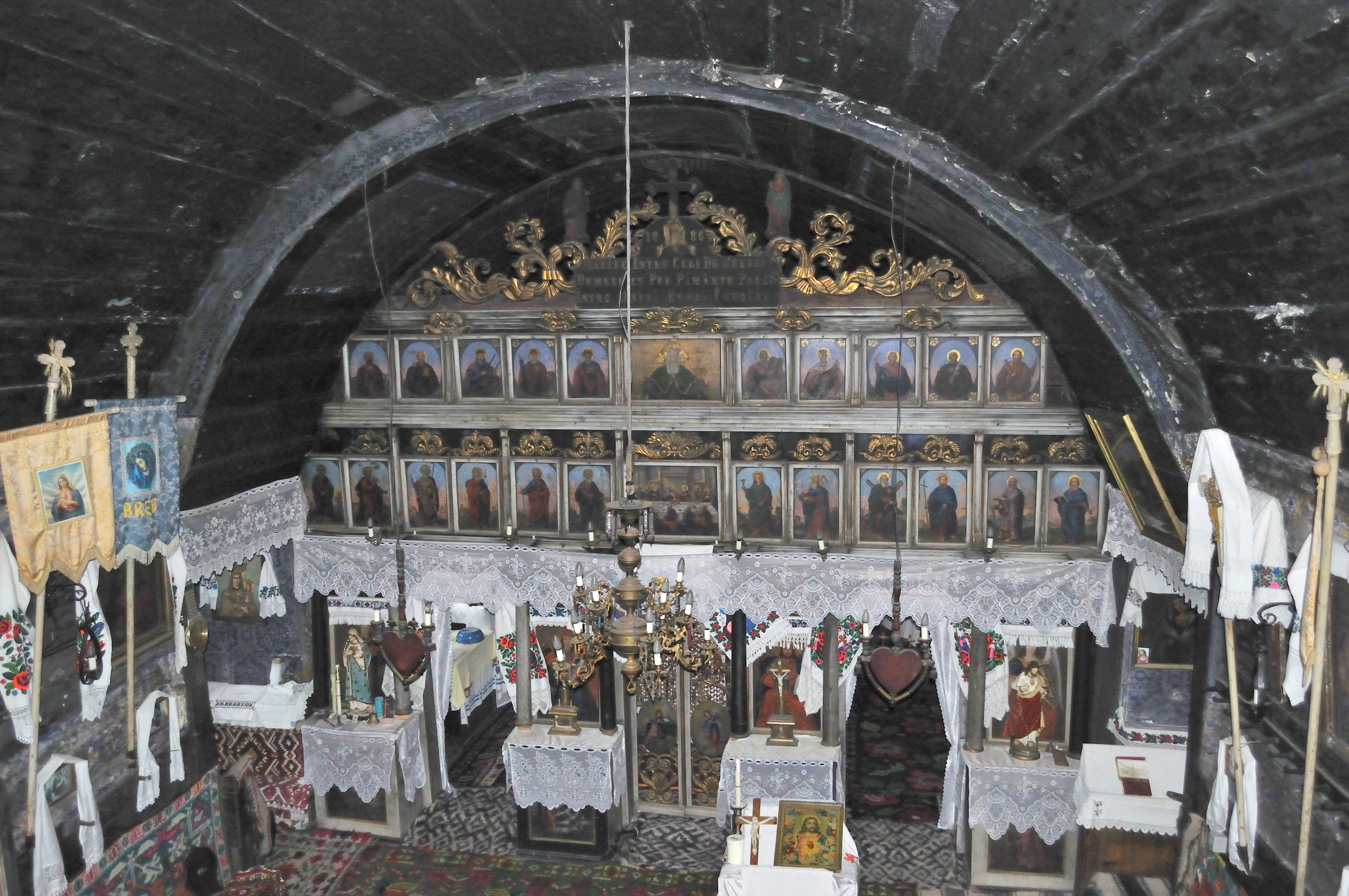 Biserica de lemn din Breb, județul Matramureș 01